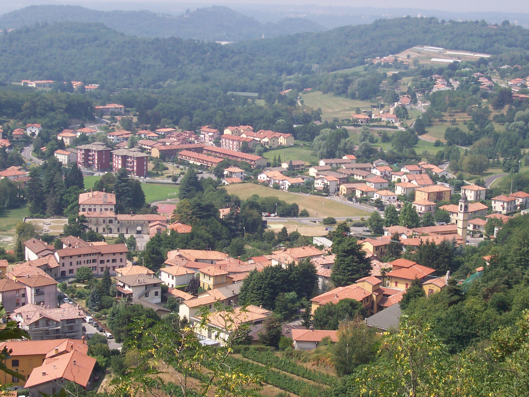 Punto panoramico del Monte Sasso verso Cavallasca